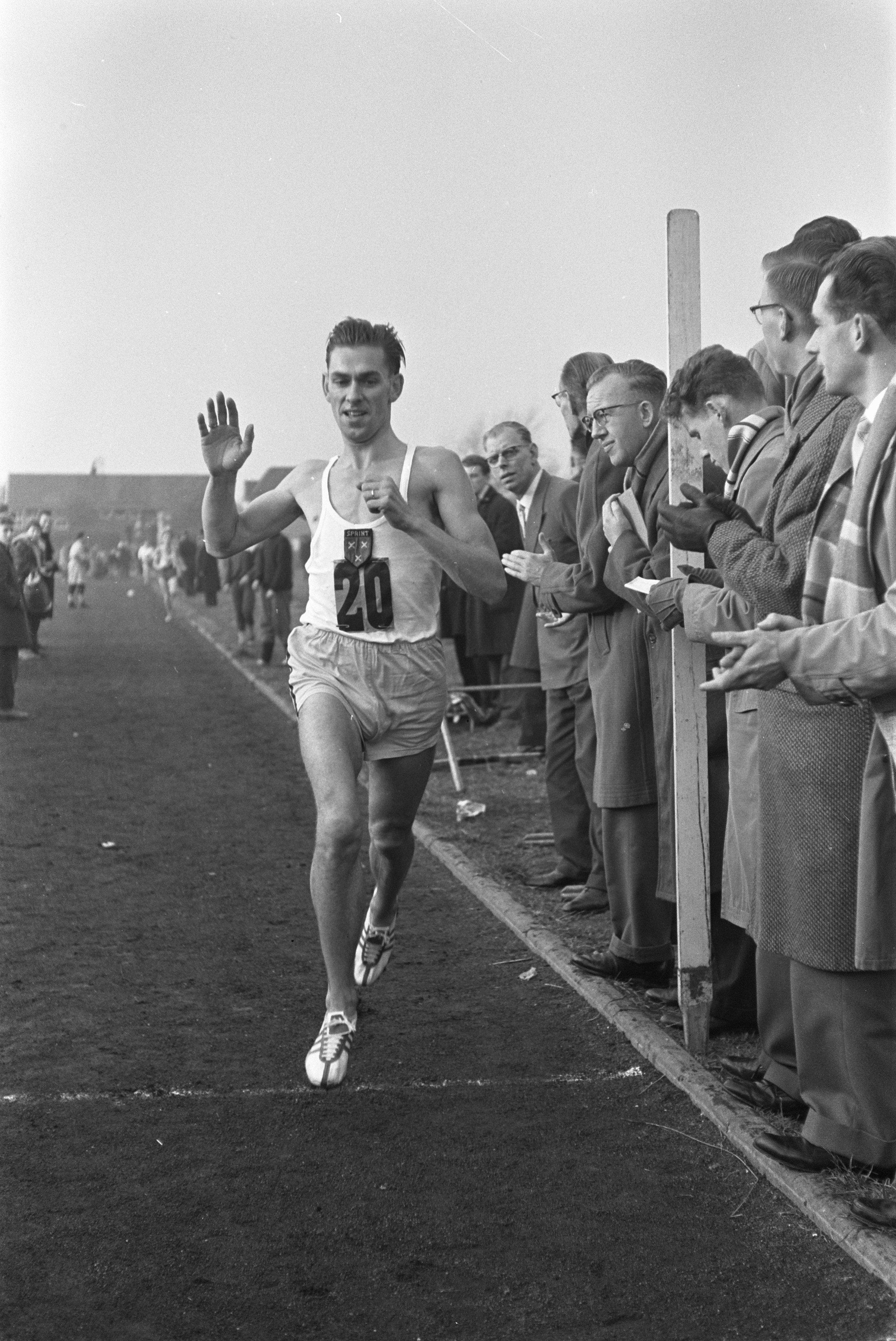 Collectie / Archief : Fotocollectie Anefo Reportage / Serie : [ onbekend ] Beschrijving : Nederlandse veldloopkampioenschap in Dordrecht Datum : 8 november 1959 Locatie : Dordrecht Trefwoorden : veldloopkampioenschappen Fotograaf : Pot, Harry / Anefo Auteursrechthebbende : Nationaal Archief Materiaalsoort : Negatief (zwart/wit) Nummer archiefinventaris : bekijk toegang 2.24.01.05 Bestanddeelnummer : 910-8068